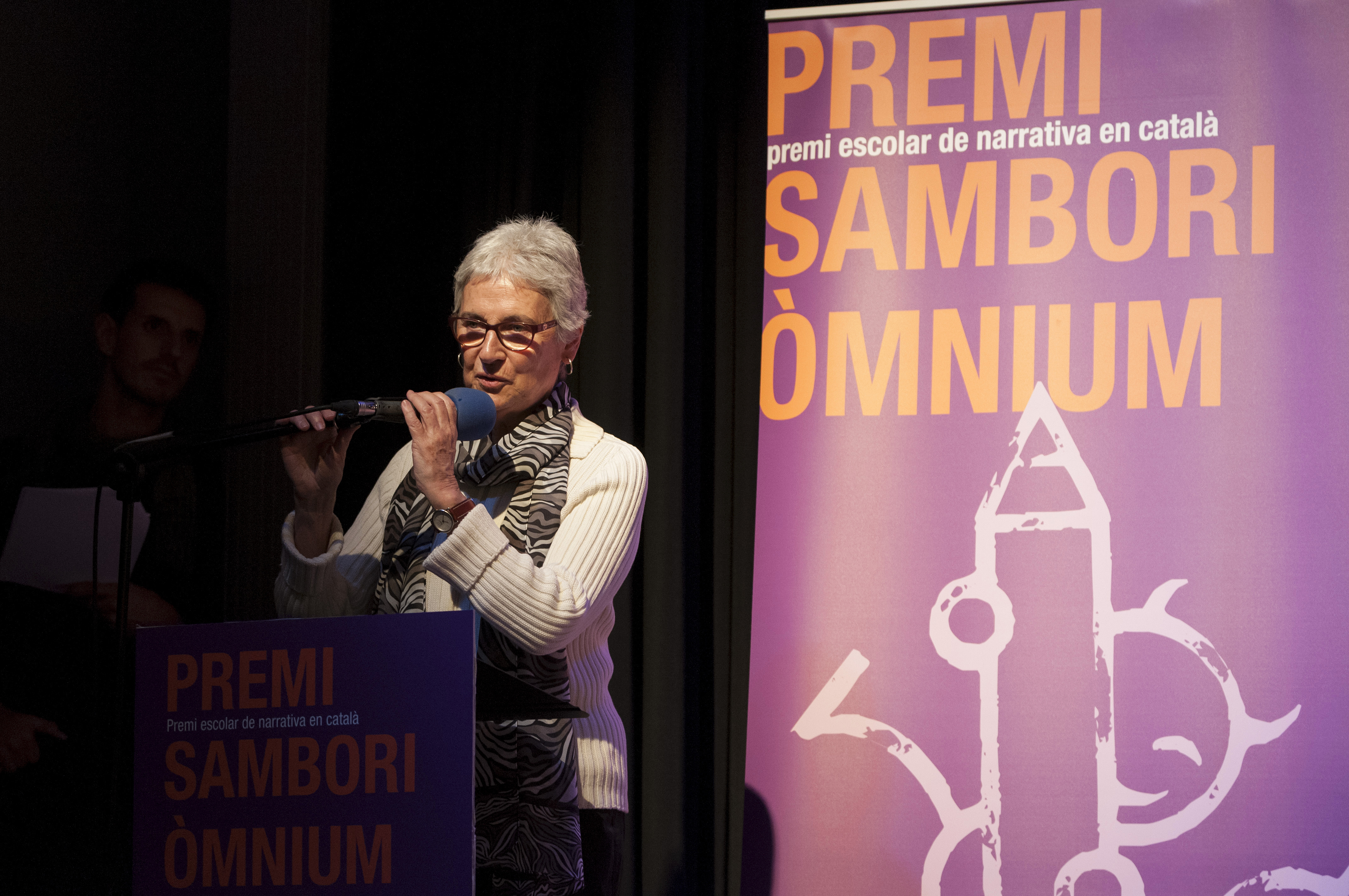 Muriel Casals, en un moment del lliurament dels premis